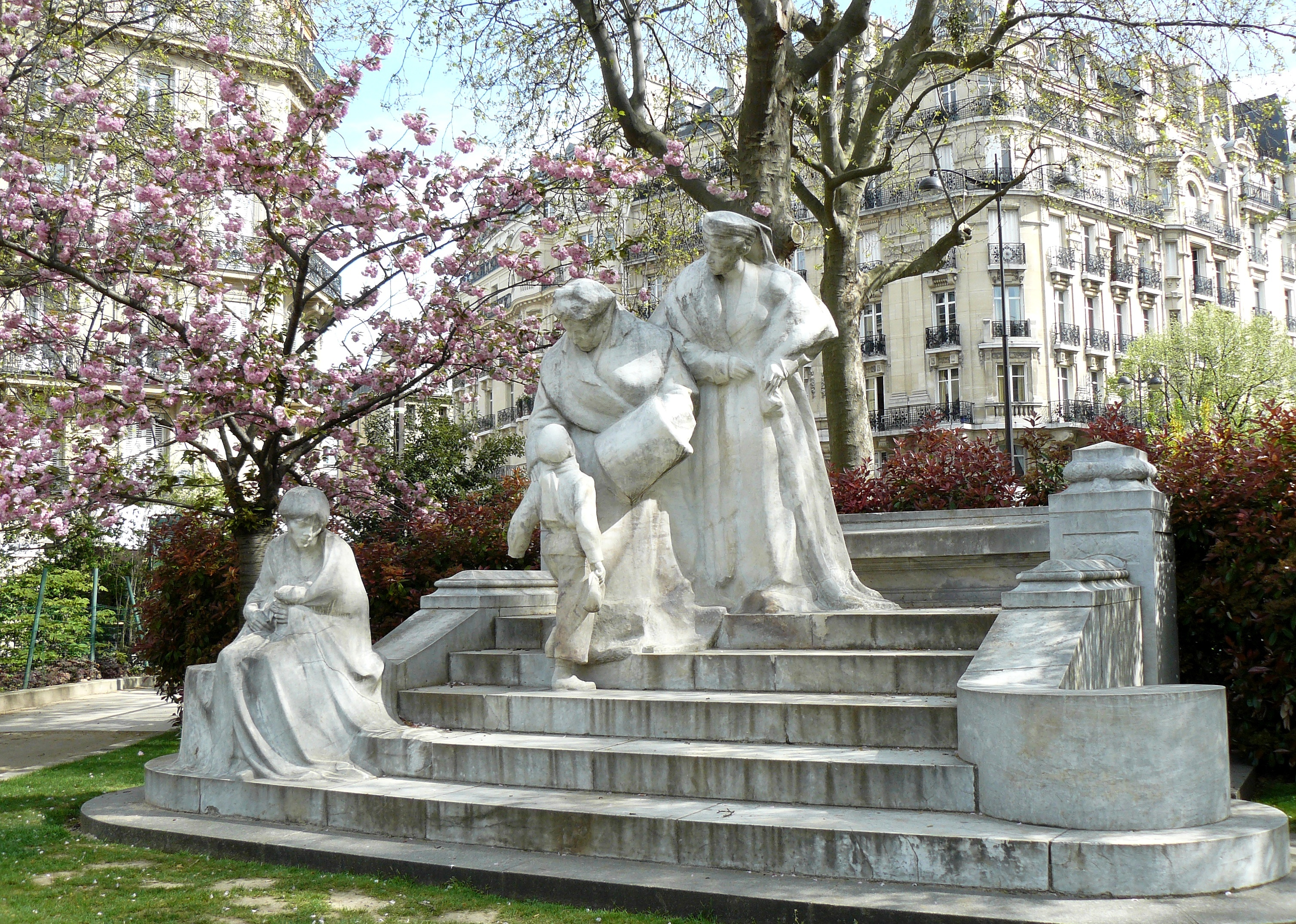 Monument dédié à Marguerite Boucicaut et Madame de Hirsh dans le square Boucicaut (Paris, 7ème arrd.). Sculpteur Paul Moreau-Vauthier (1871-1936)